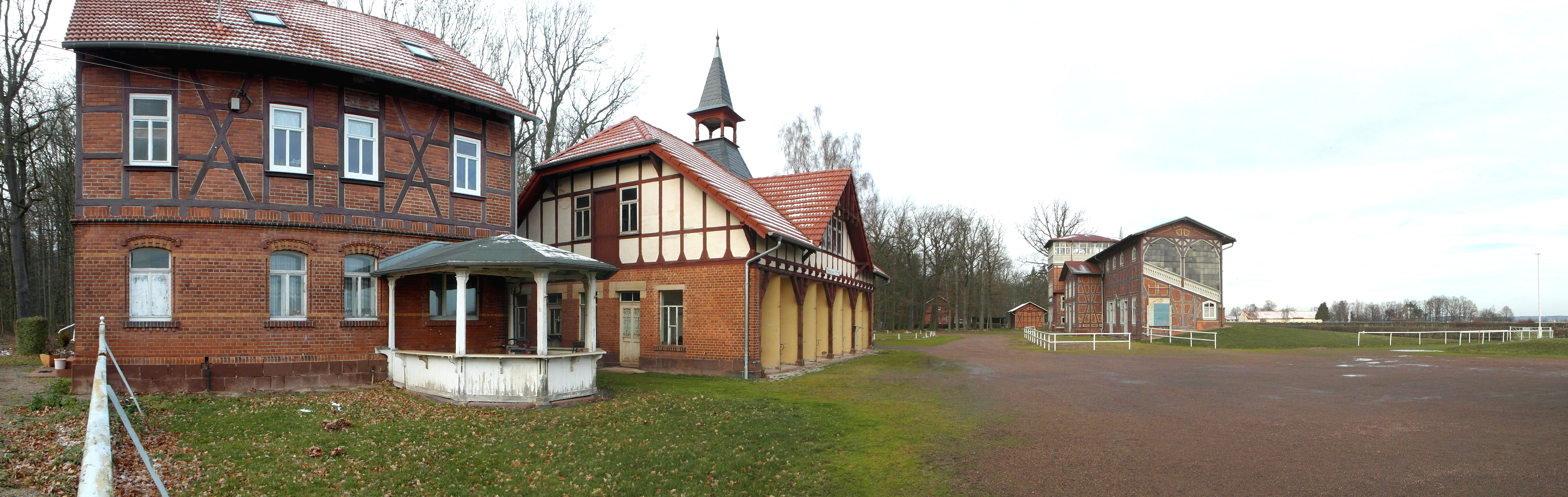 Die Pferderennbahn Boxberg entstand 1878 aus einem ehemaligen Exerzierplatz. Einzige Anlage ihrer Art in Thüringen.